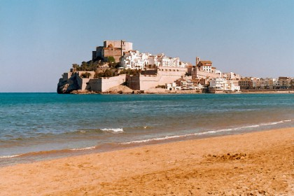 Vista de la peninsula de Peñiscola.